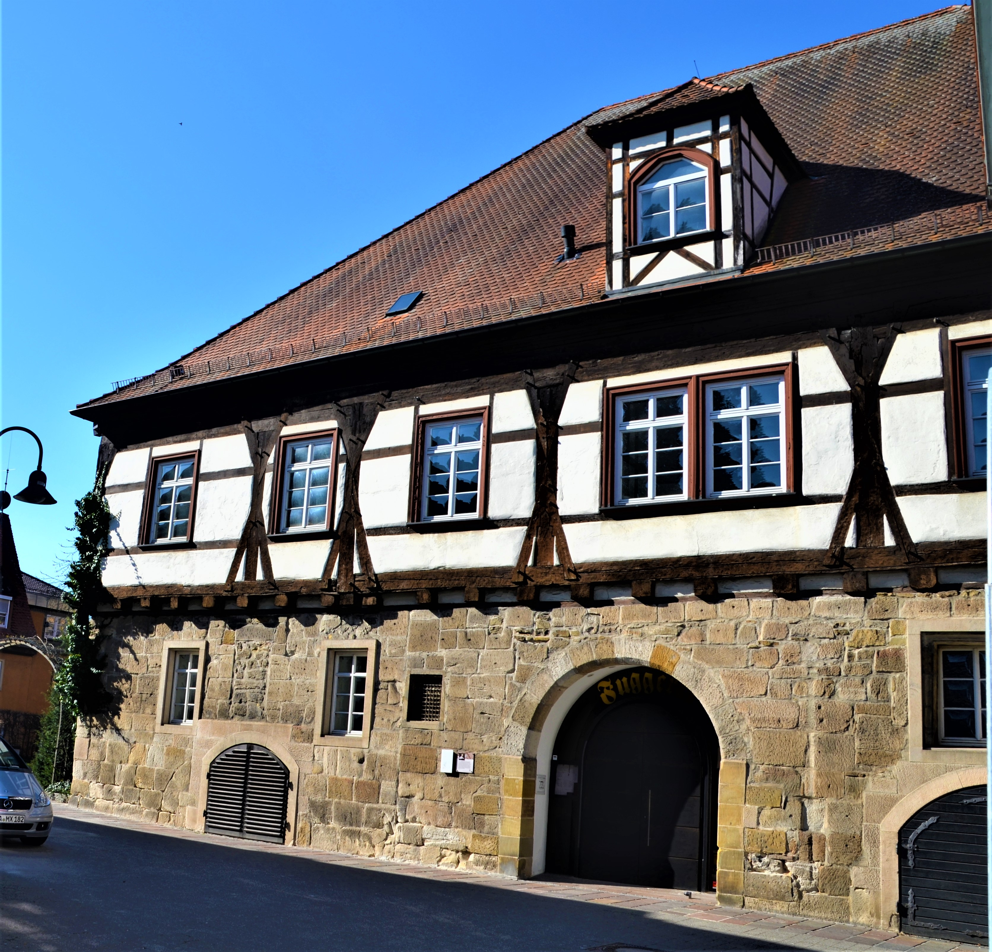 Fuggerei Schwäbisch Gmünd, Fassade zur Münstergasse hin